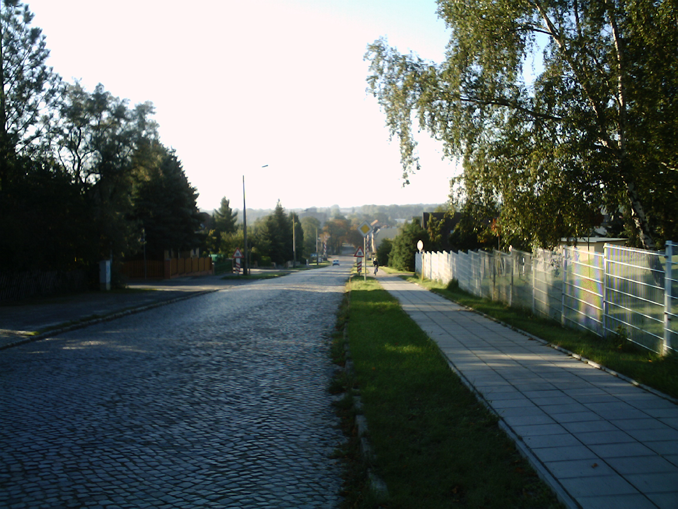 Blick vom Winterberg in Elsterwerda-Biehla